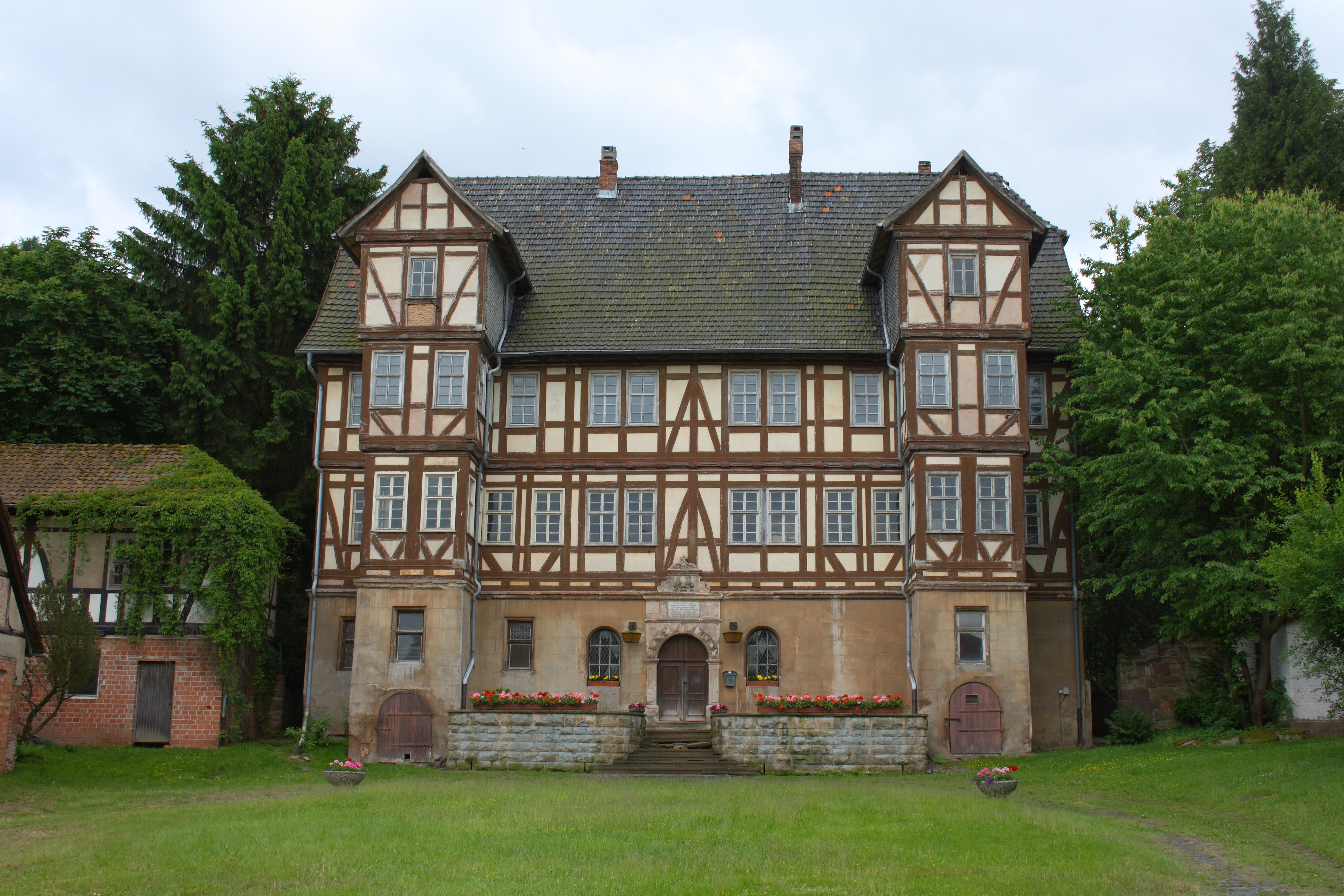 Rittergut Aue in Aue, einem Ortsteil von Wanfried im Werra-Meißner-Kreis (Hessen), Herrensitz der Herren von Eschwege